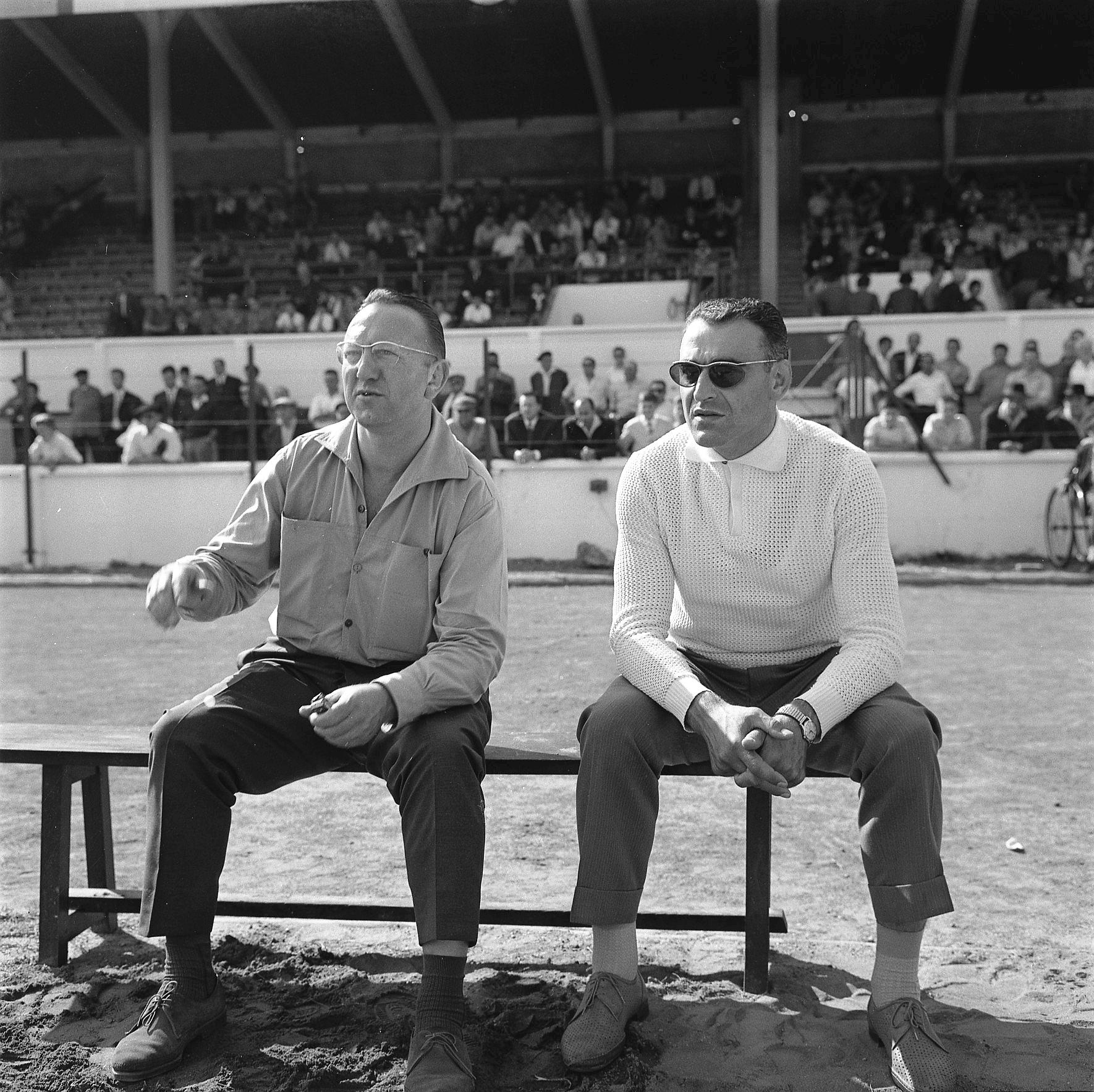 Stade Ernest Wallon. Le 24 Septembre 1961. Vue des entraîneurs du Stade Toulousain, Yves Noé et Domec, sur le banc de touche.